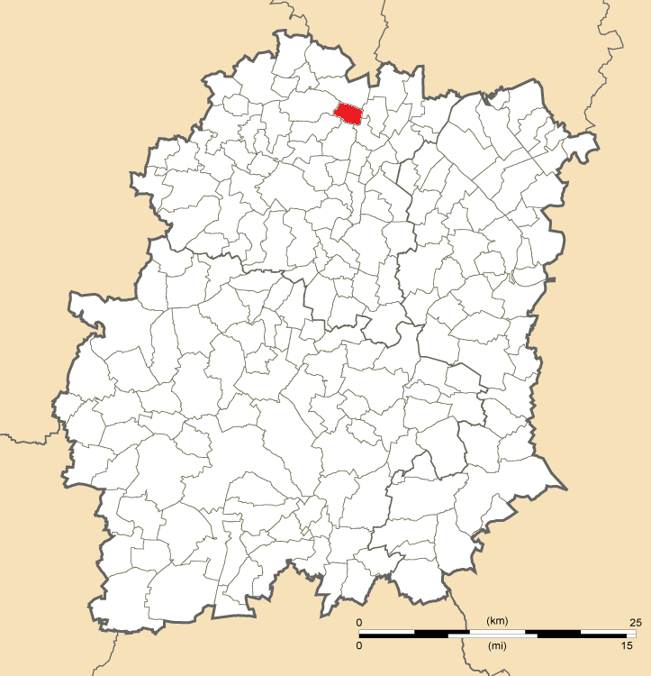 Carte de position de Champlan en Essonne.